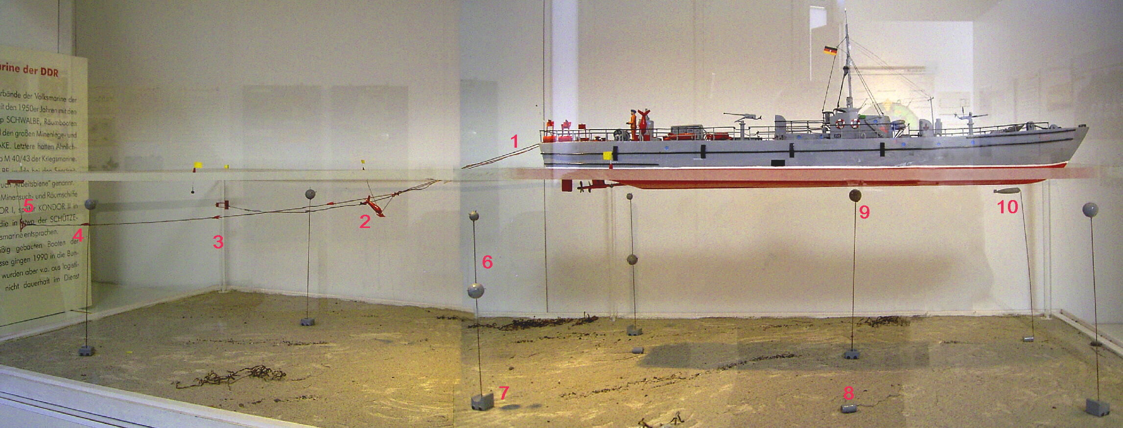 Diorama eines DDR-Räumbootes mit Räumgeschirr im Deutschen Marinemuseum. 1 Schlepptrossen; 2 Tiefendrachen; 3 Greifer; 4 Greifer fasst Ankertau; 5 Scherdrachen; 6 - 10 Minen (Das Bild wurde aus zwei Aufnahmen zusammengesetzt und retouchiert)